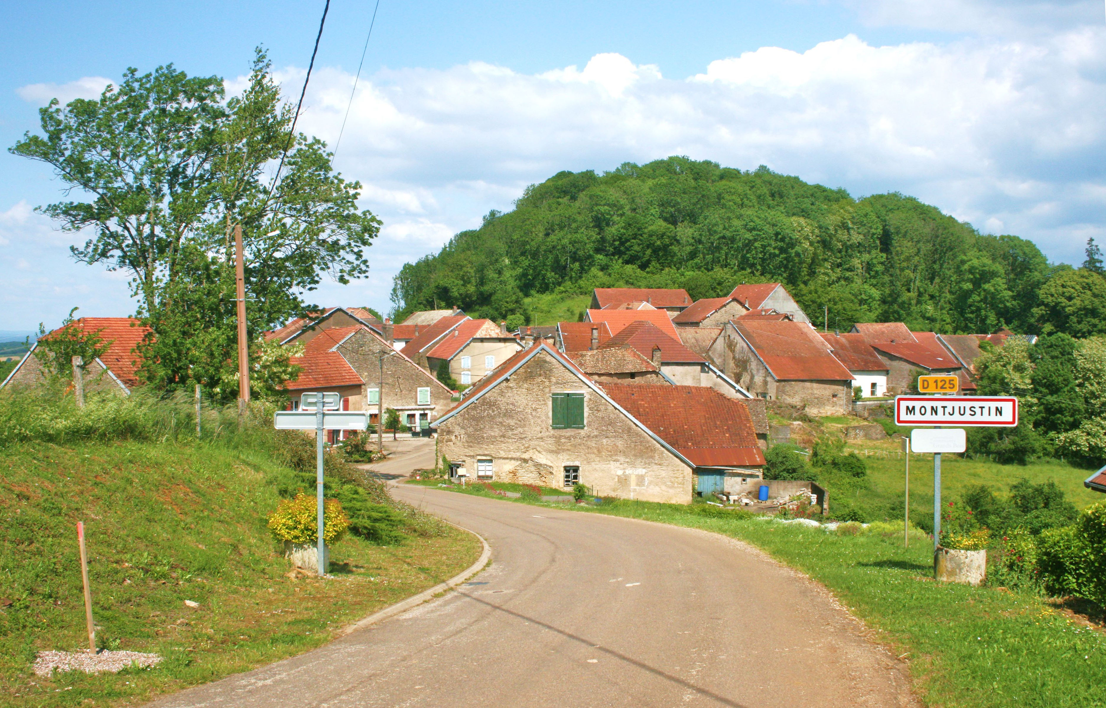 Panorama sur le village de Montjustin.